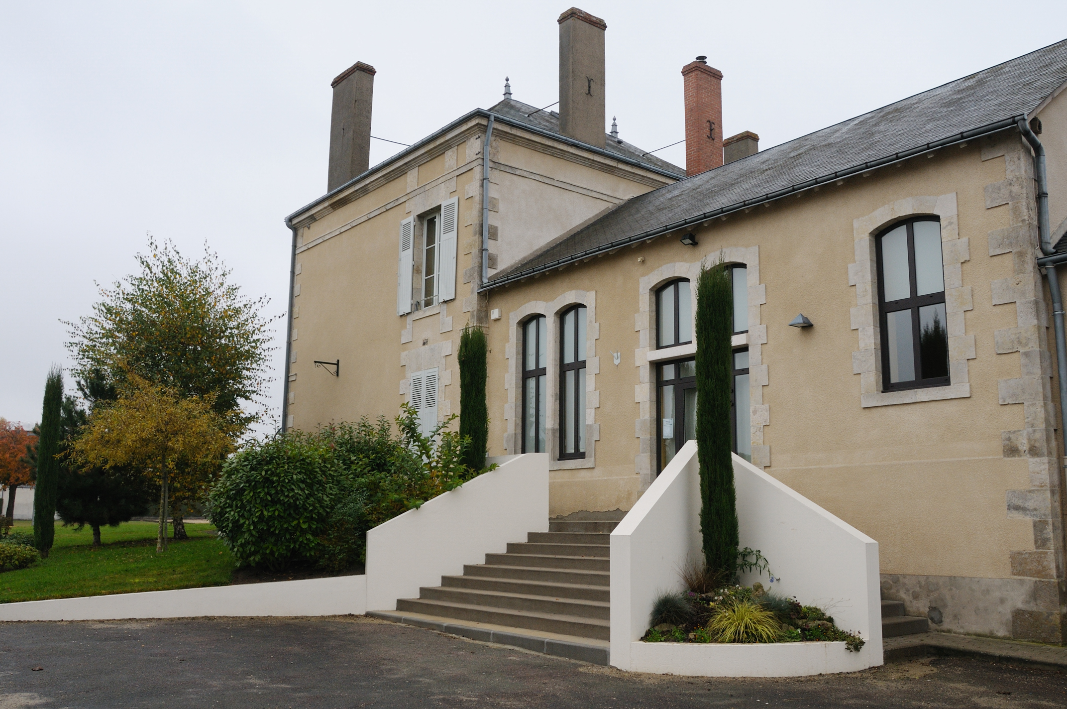 Mairie de Vennecy, Loiret, France